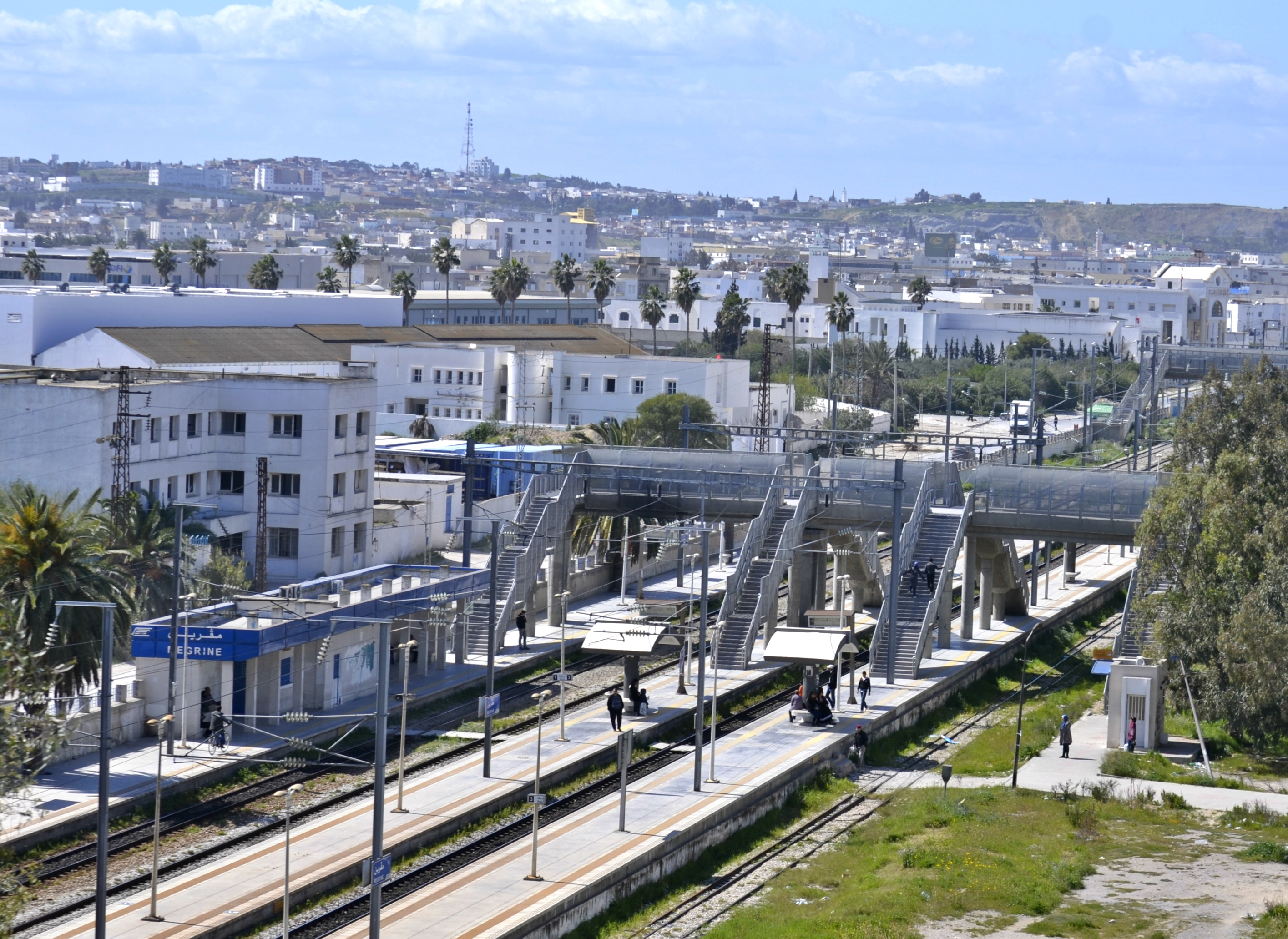 Gare de Mégrine